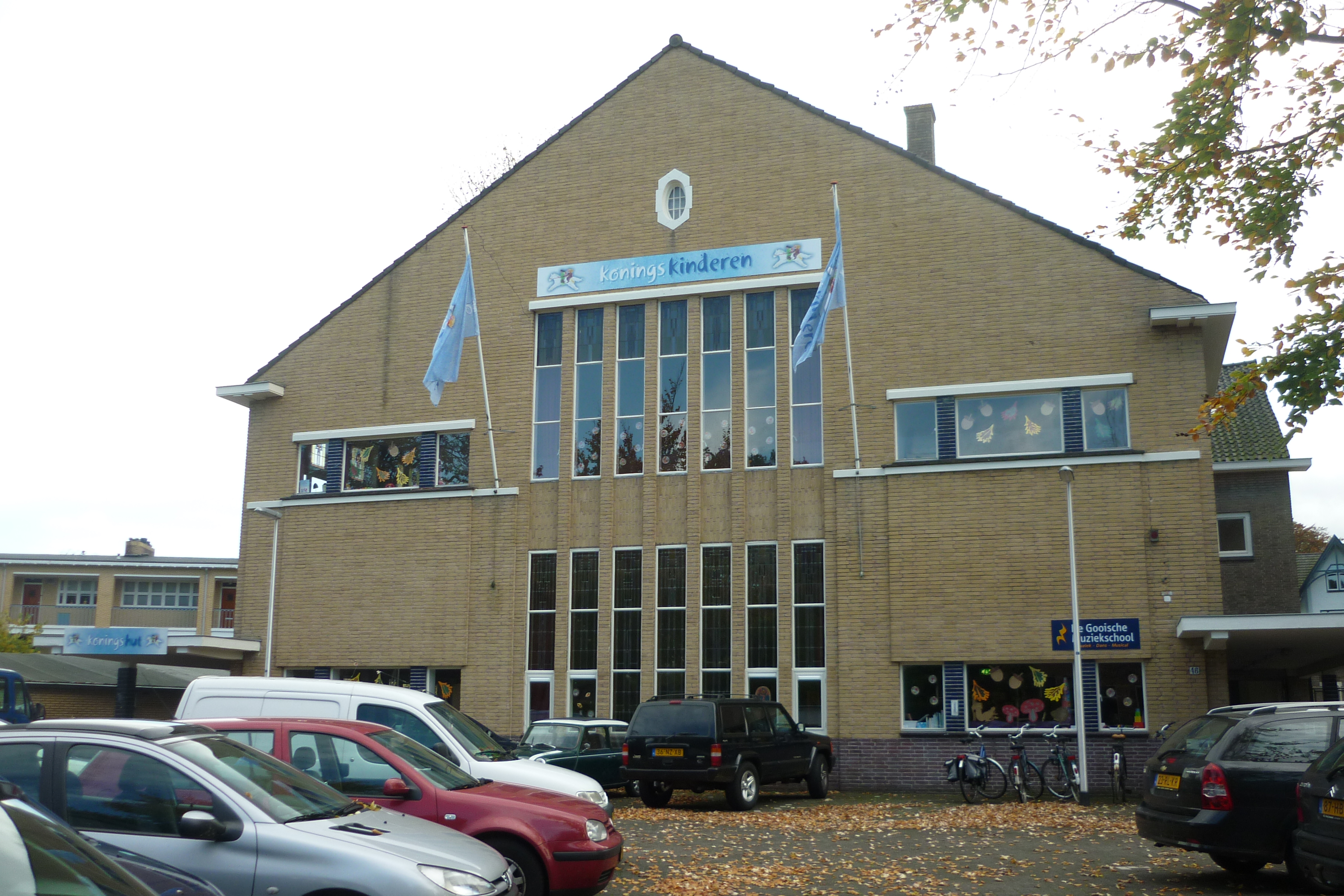 Concordia, voormalige TV studio in Bussum